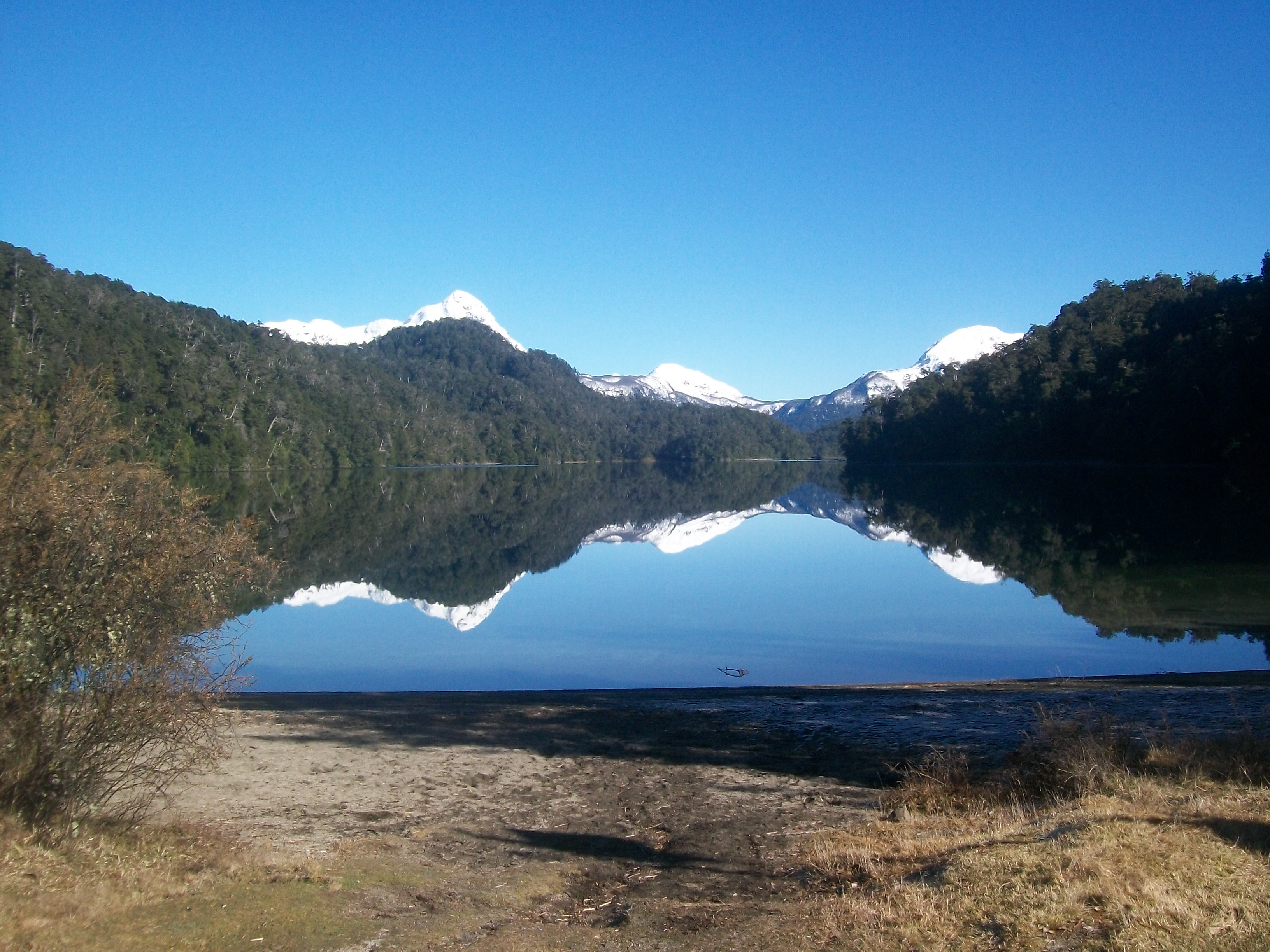 Lago Espejo Chico, camino de los siete lagos, Neuquén, Argentina